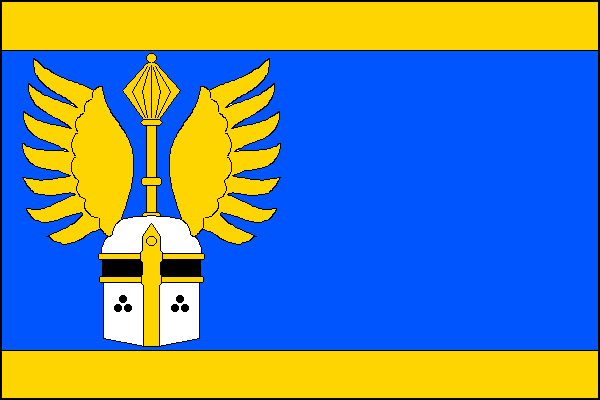 vlajka, Rataje, okres Tábor